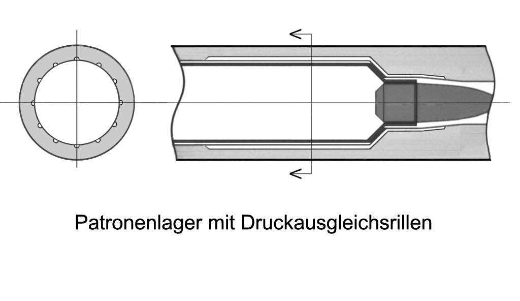 Patronenlager Druckausgleich